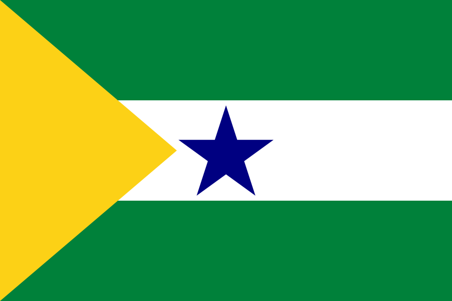 Bandera de Marcabelí